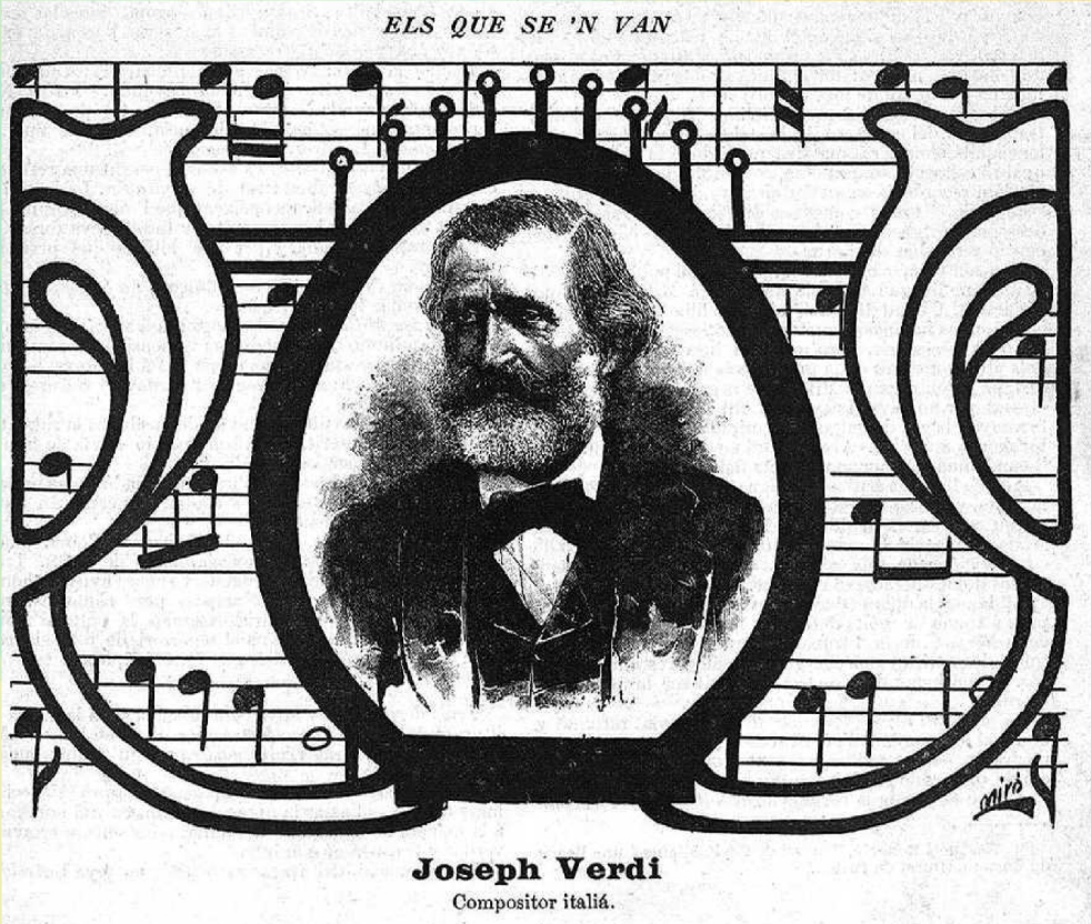 Cap de Brot a la revista de La Esquella de la Torratxa